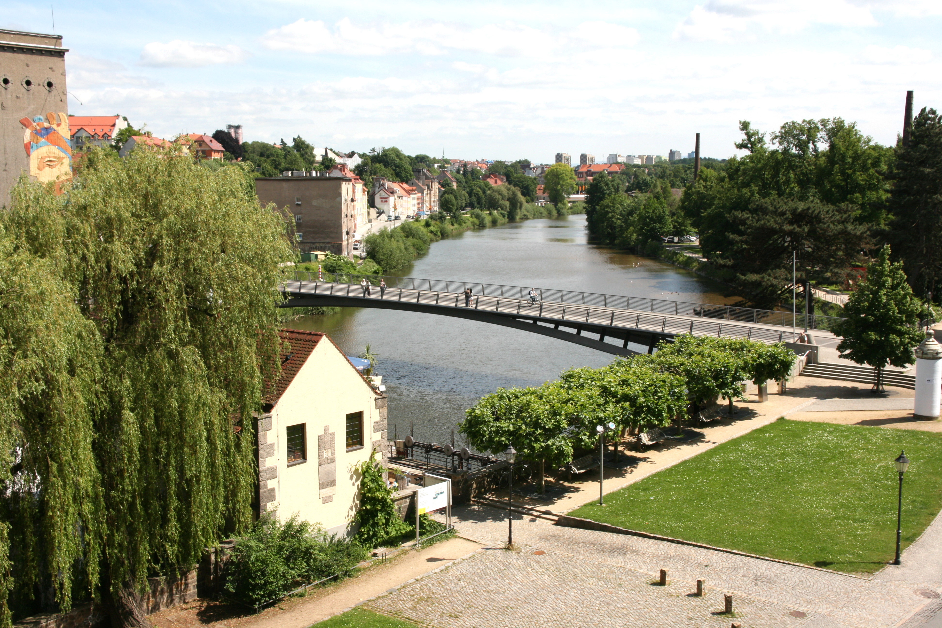 Altstadtbrücke in Görlitz